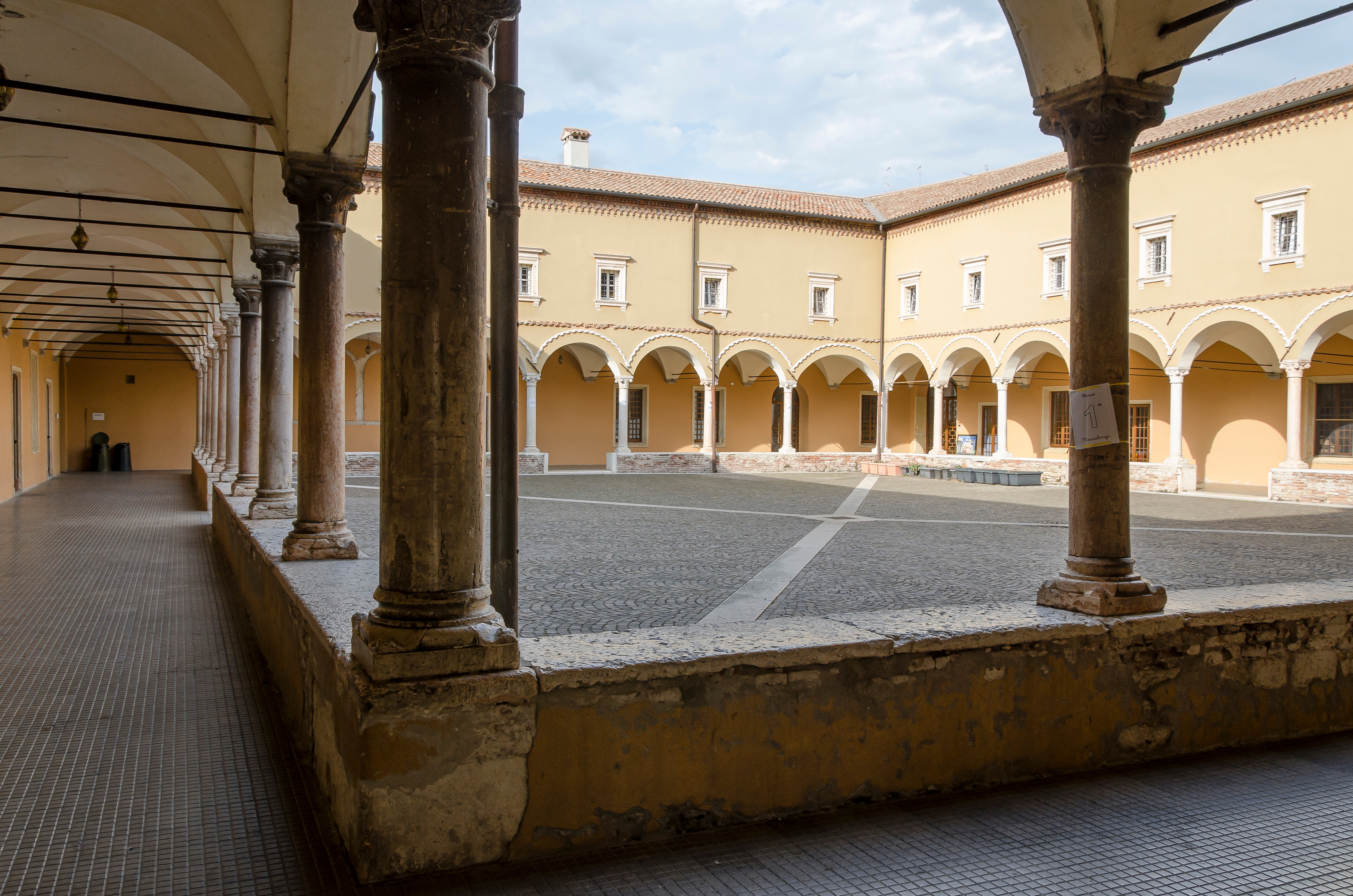 Chiostro di sinistra